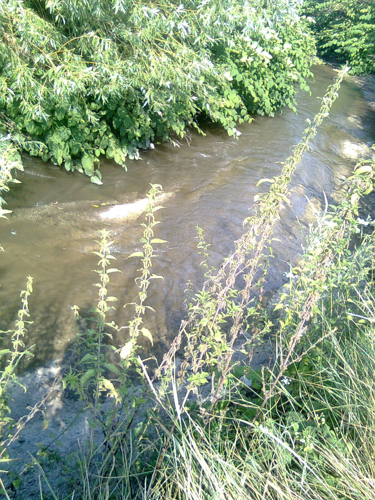 Az Eger-patak Maklár és Szihalom közti szakasza